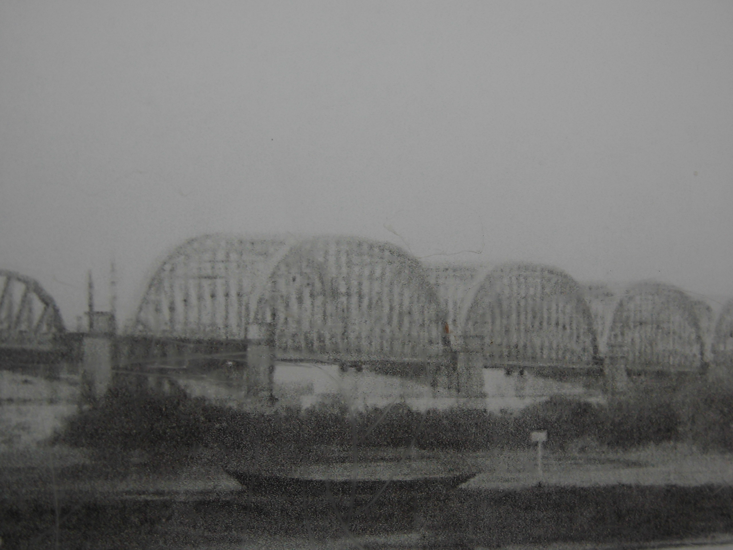 Drehbrücke u. Bögen über den Strom